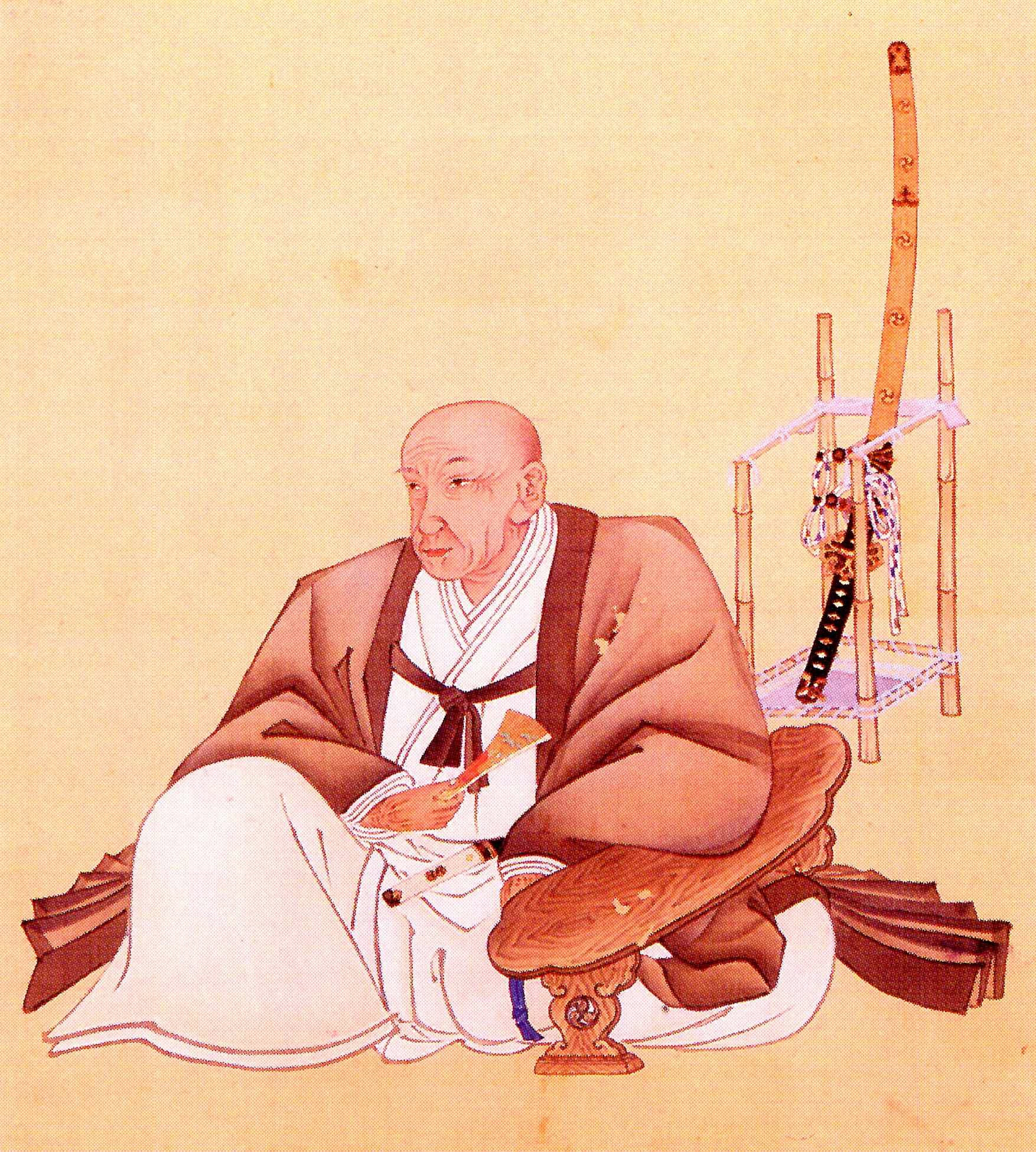 岡部長慎の肖像。